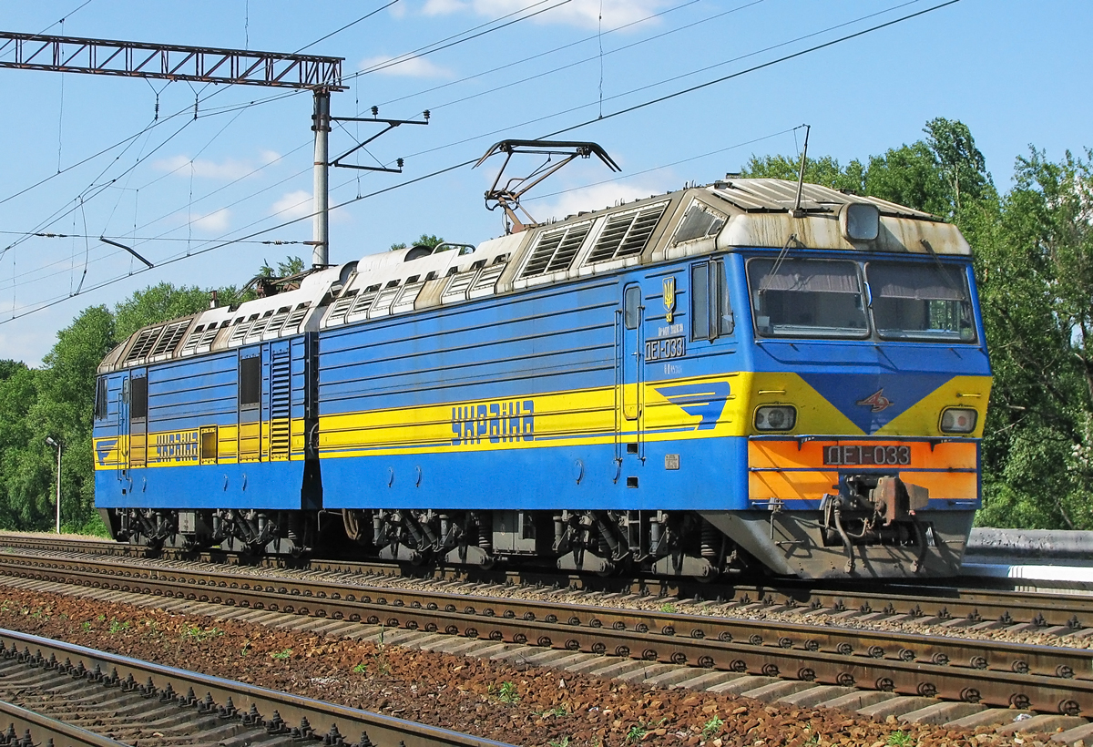 Электровоз ДЭ1-033 на платформе Пост-Амур, г.Днепропетровск